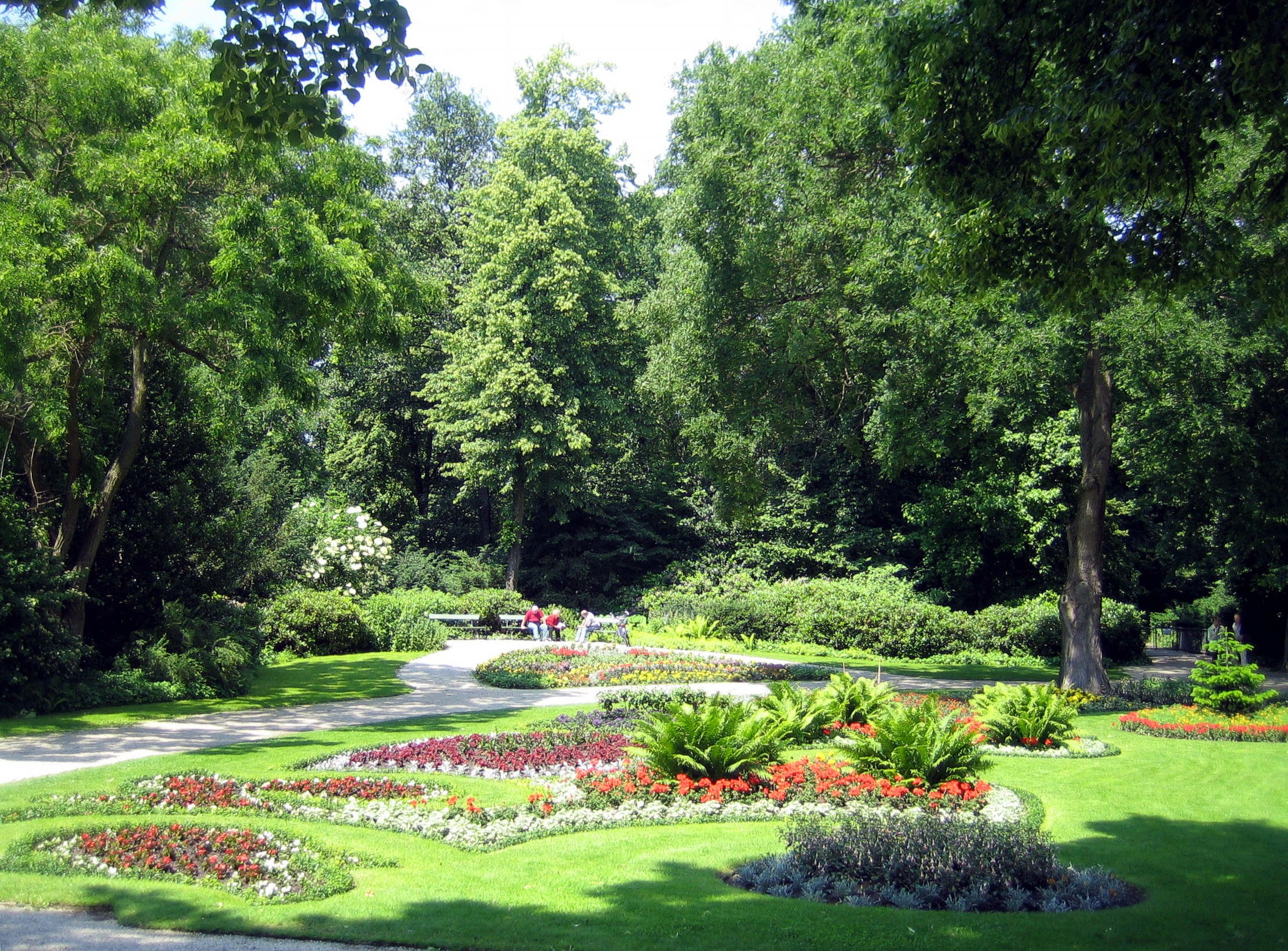 Berlin, Großer Tiergarten, auf der Luiseninsel, Juni 2009.